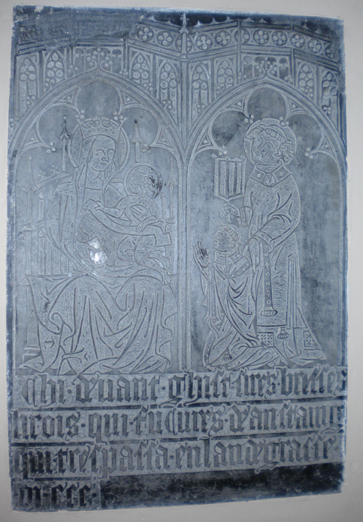 Anstaing_église Saint Laurent_plaque murale